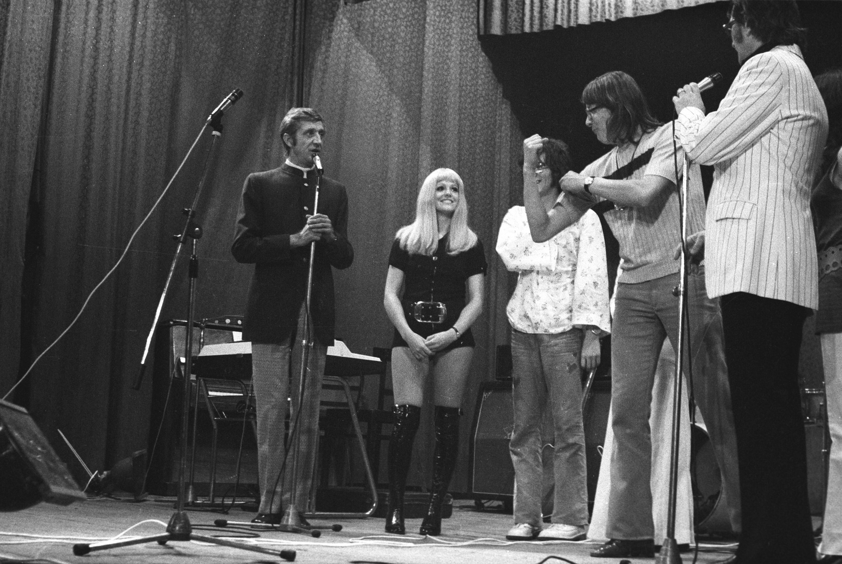 balról Ősz Ferenc humorista, Cserháti Zsuzsa, Delhusa Gjon, ?, Payer András. Location: Hungary Title: balról Ősz Ferenc humorista, Cserháti Zsuzsa, Delhusa Gjon, ?, Payer András.